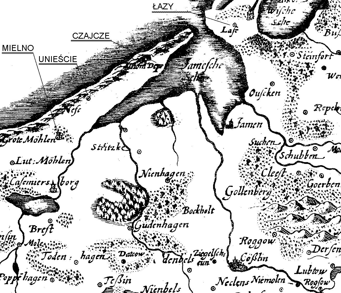 Fragment mapy Lubiniusa z 1625 roku przedstawiający Jezioro Jamno i miejscowości je otaczające.